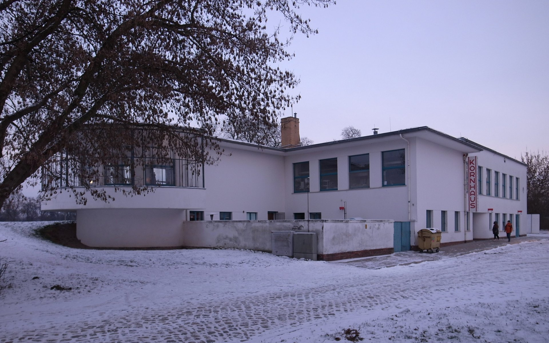 Kornhaus Dessau, Winter